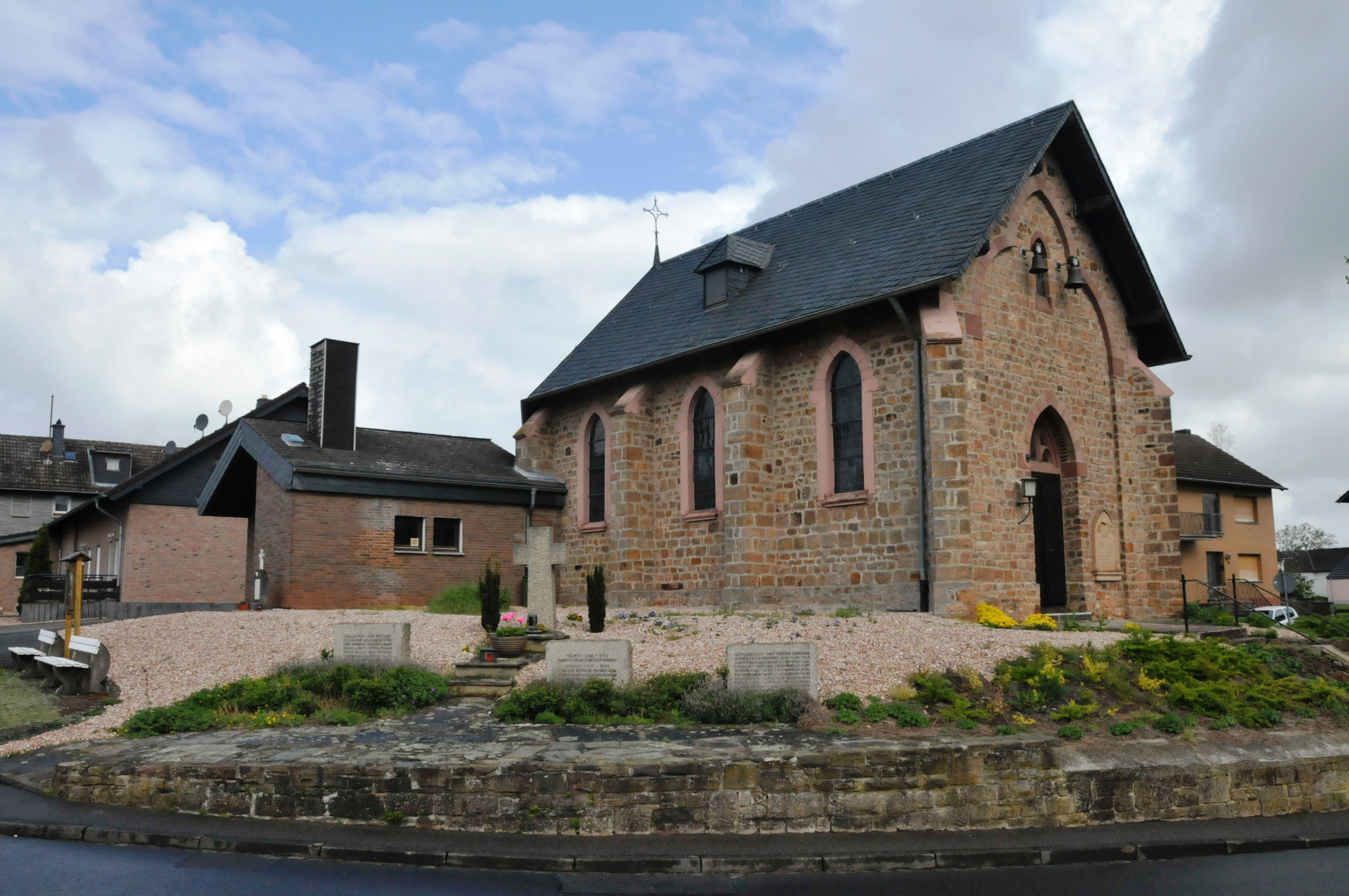 Mechernich-Kalenberg: Kapelle